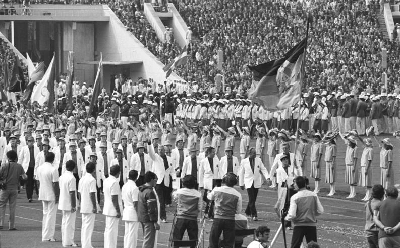 ADN-ZB/Mittelstädt-19.7.80 Moskau: Olympia Vor 100.000 Zuschauern wurden im Lenin-Stadion des Lushniki-Sportparks die XXII. Olympischen Sommerspiele feierlich eröffnet. Herzlich begrüßten die Moskauer und ihre Gäste die DDR-Vertretung bei ihrem Einmarsch in das Stadion.